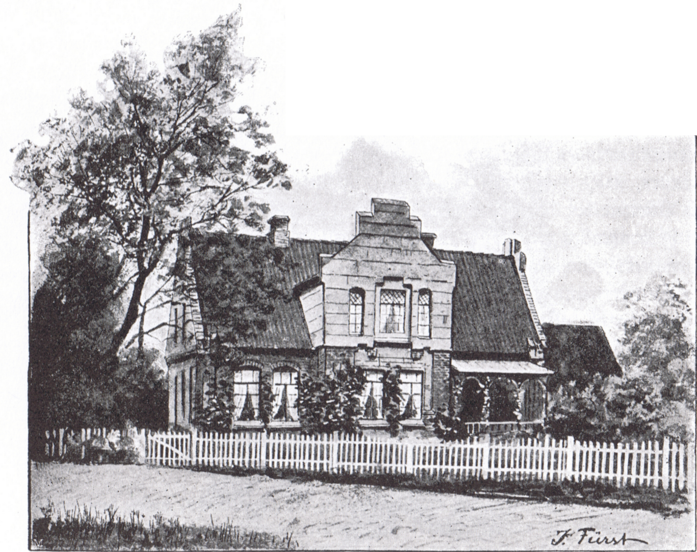 Theodor Storms Wohnhaus in Hanerau-Hademarschen, Zeichnung von Julius Fürst.